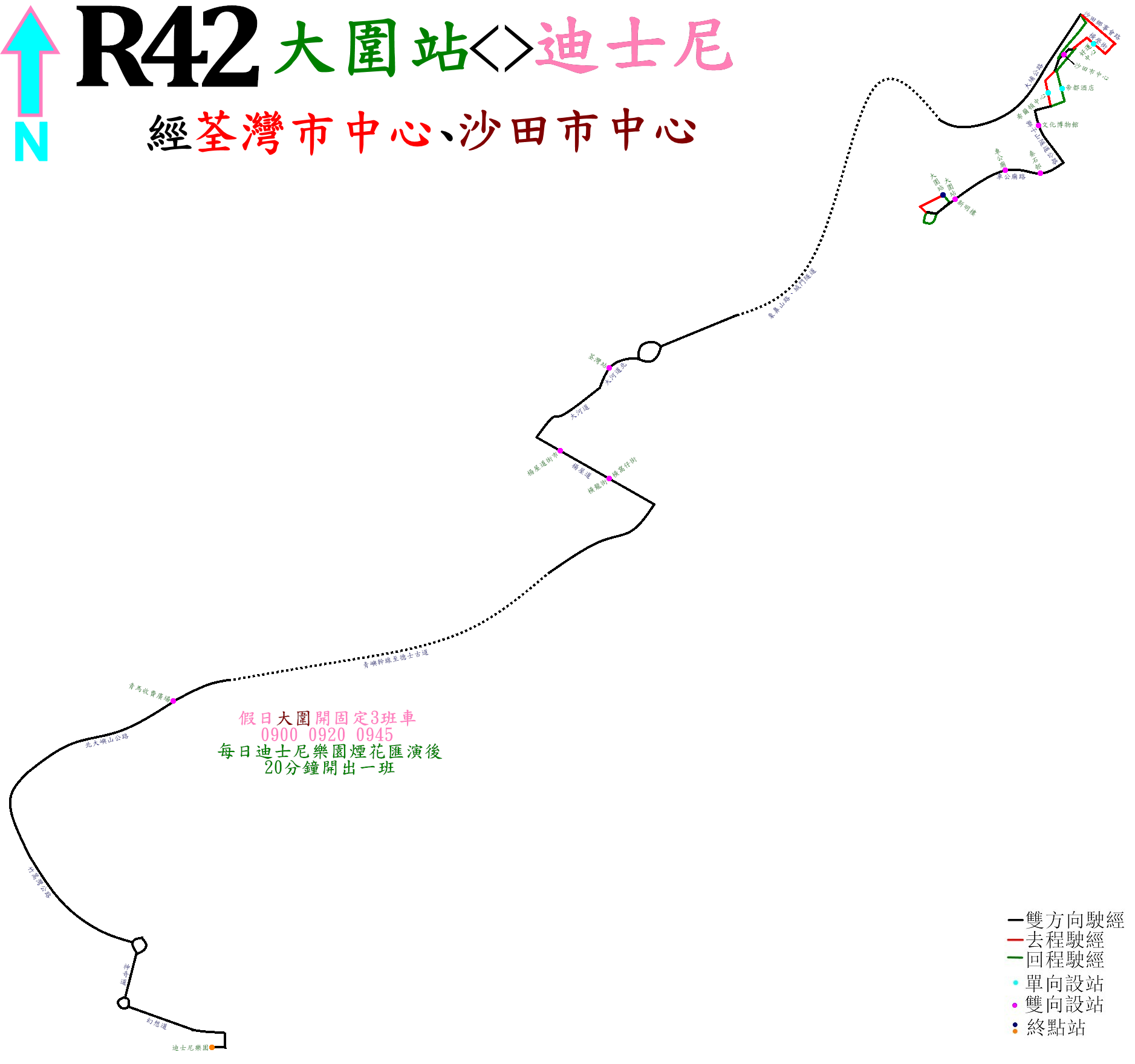 中文（香港）: 龍運巴士R42線的走線圖